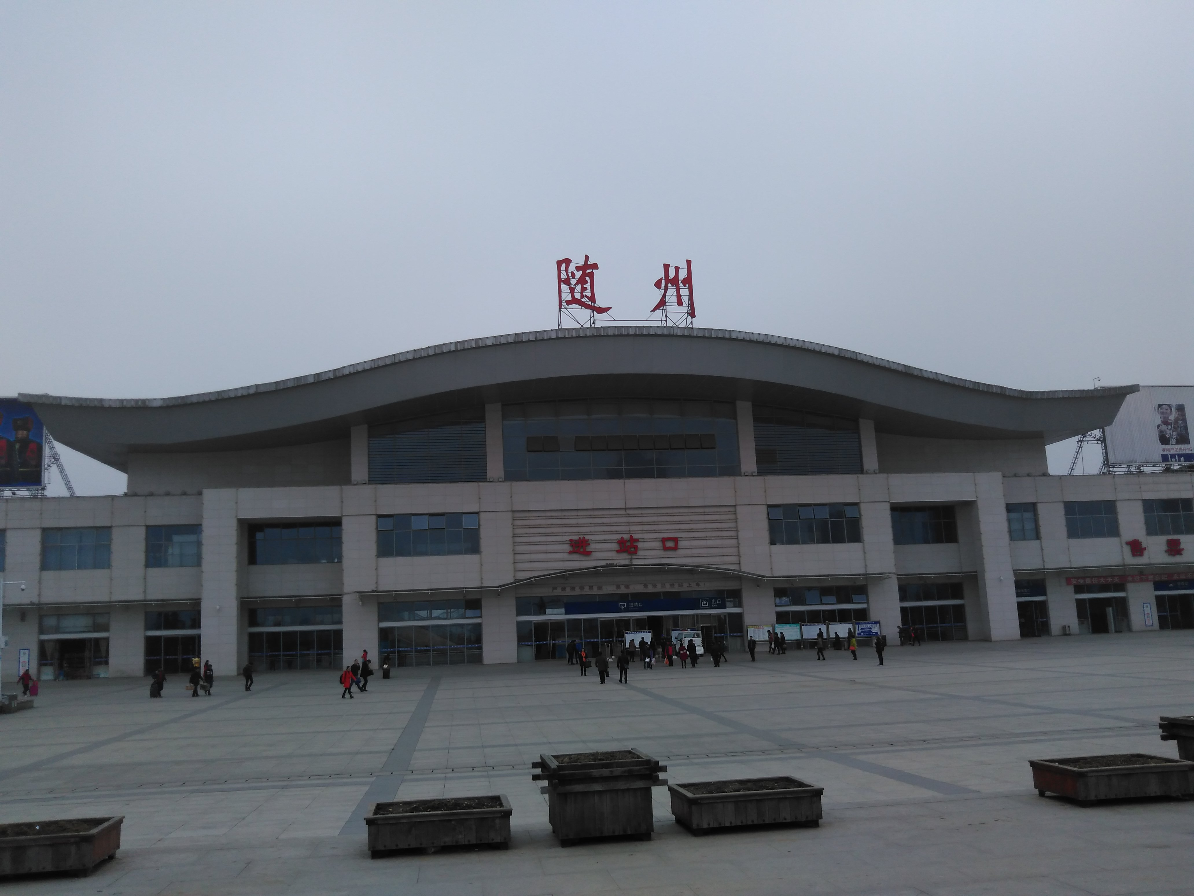 中文（中国大陆）: 湖北省随州市火车站